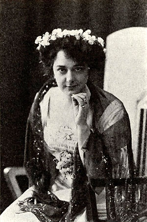 Ingeborg Rönnblad